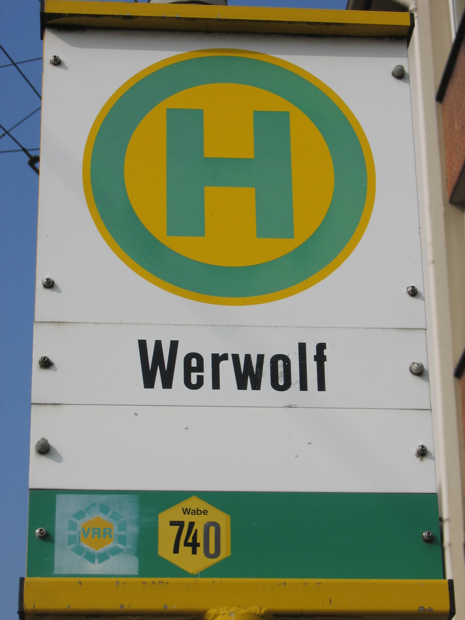 Bushaltestellenschild „Werwolf“ in Solingen